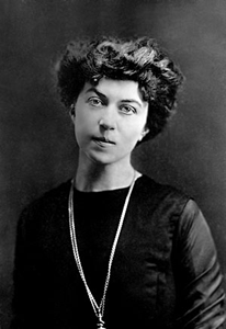 Aleksandra Kollontaj (1872-1952)